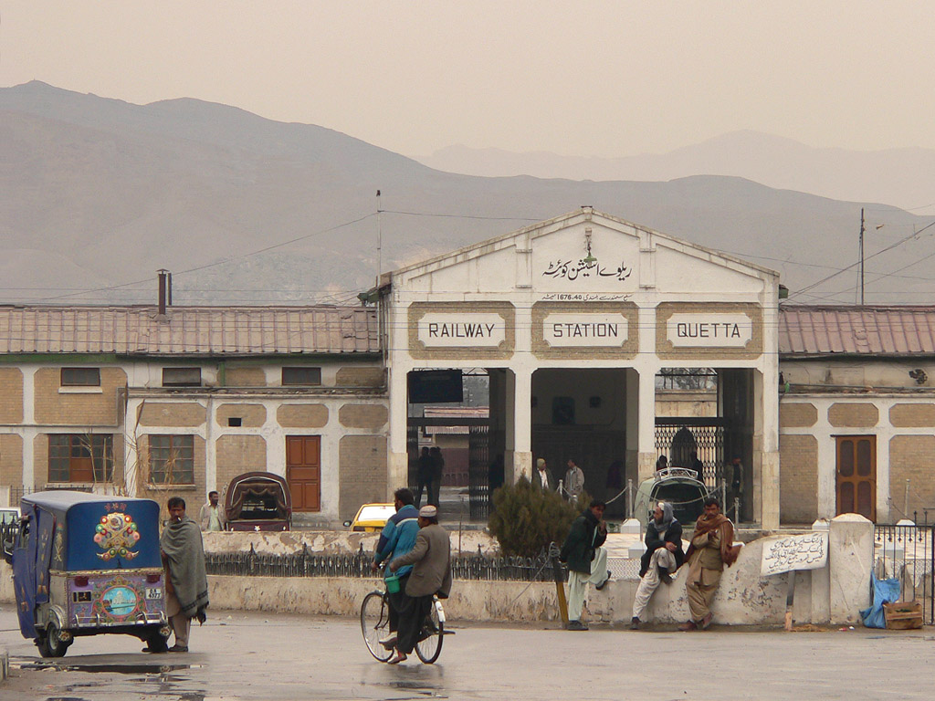 Quetta Railway Station, Quetta, Balochistan, Pakistan